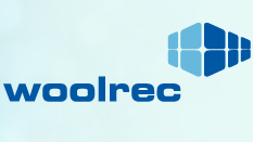 Logo der Woolrec GmbH, Braunfels-Tiefenbach